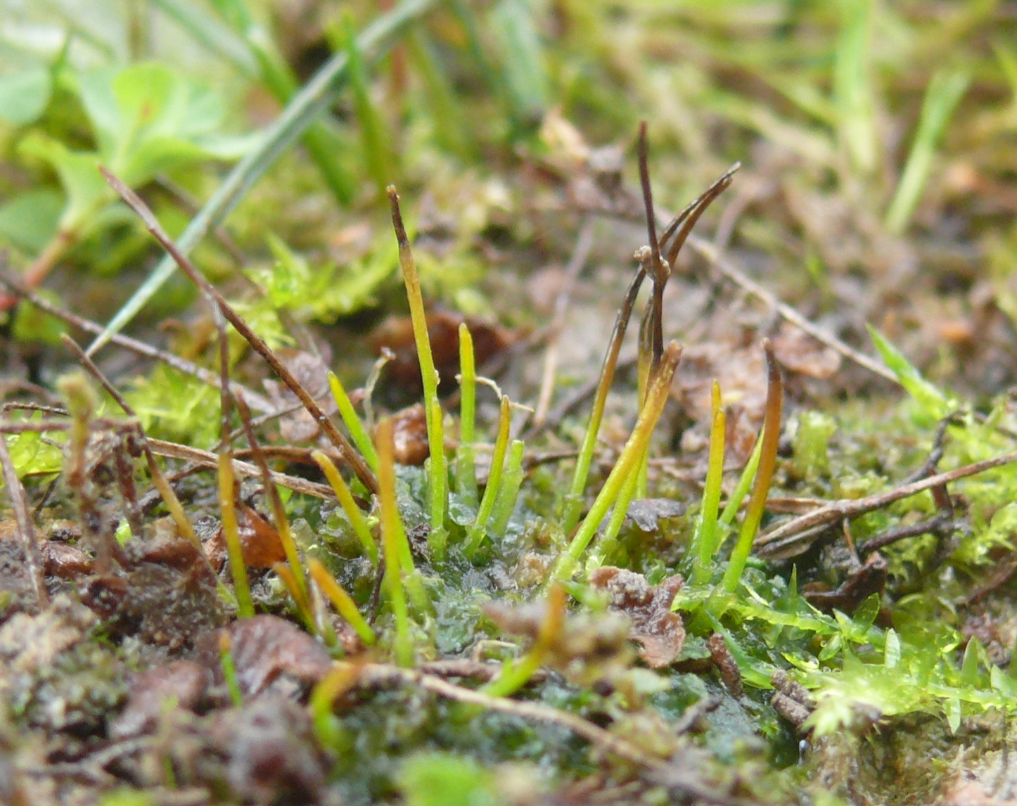 Phaeoceros carolinianus, Schwäbisch-Fränkische Waldberge